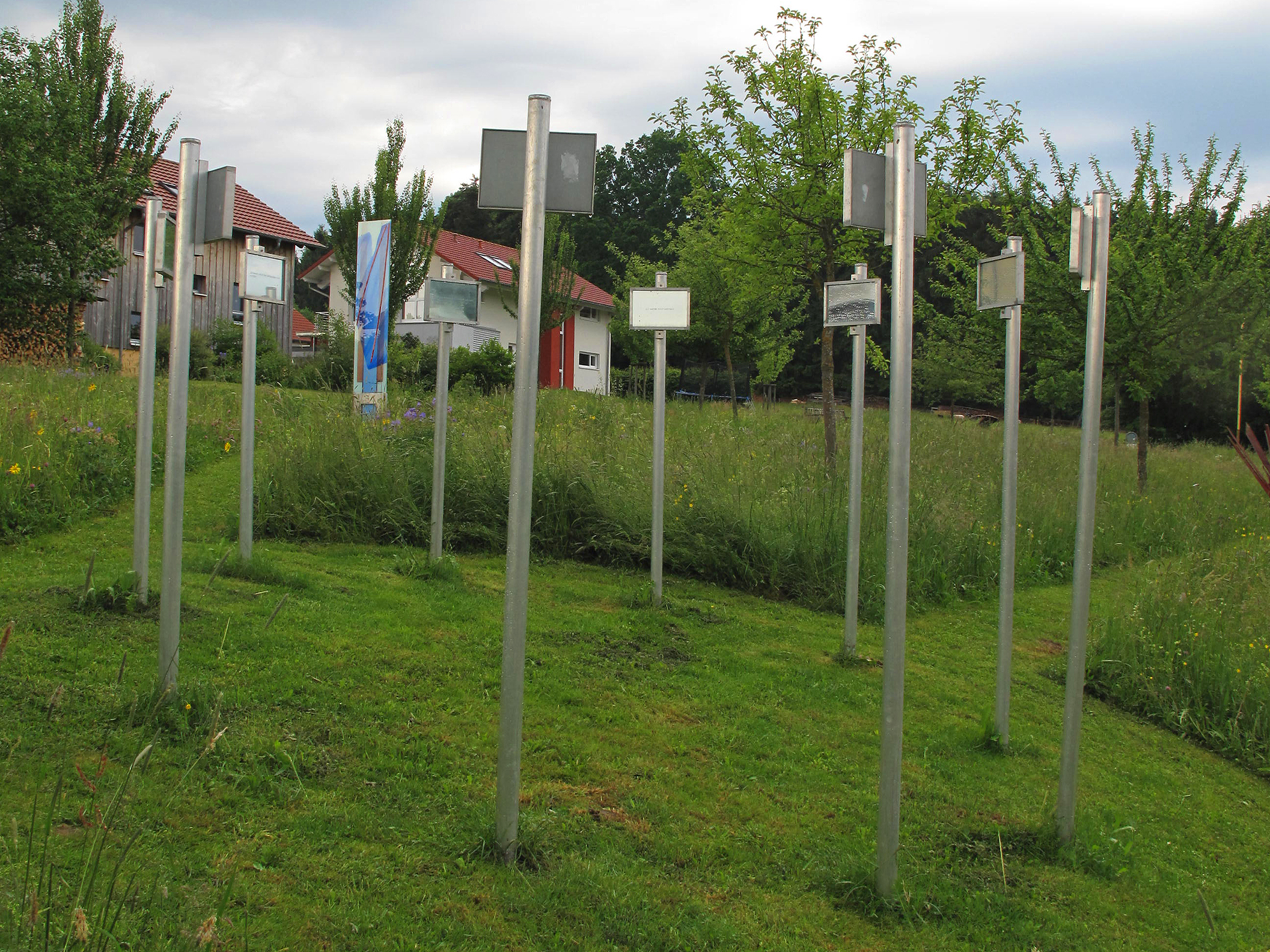 Reinhard Klessinger, Ortsbestimmung Marie Luise Kaschnitz (10-teilig), 2002, - Deutschland, Baden-Württemberg, Rottweil-Hausen, KUNSTdünger Skulpturenfeld